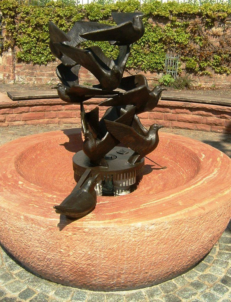 Möwenbrunnen von Gunter Ullrich in Aschaffenburg-Leider am Lukasplatz